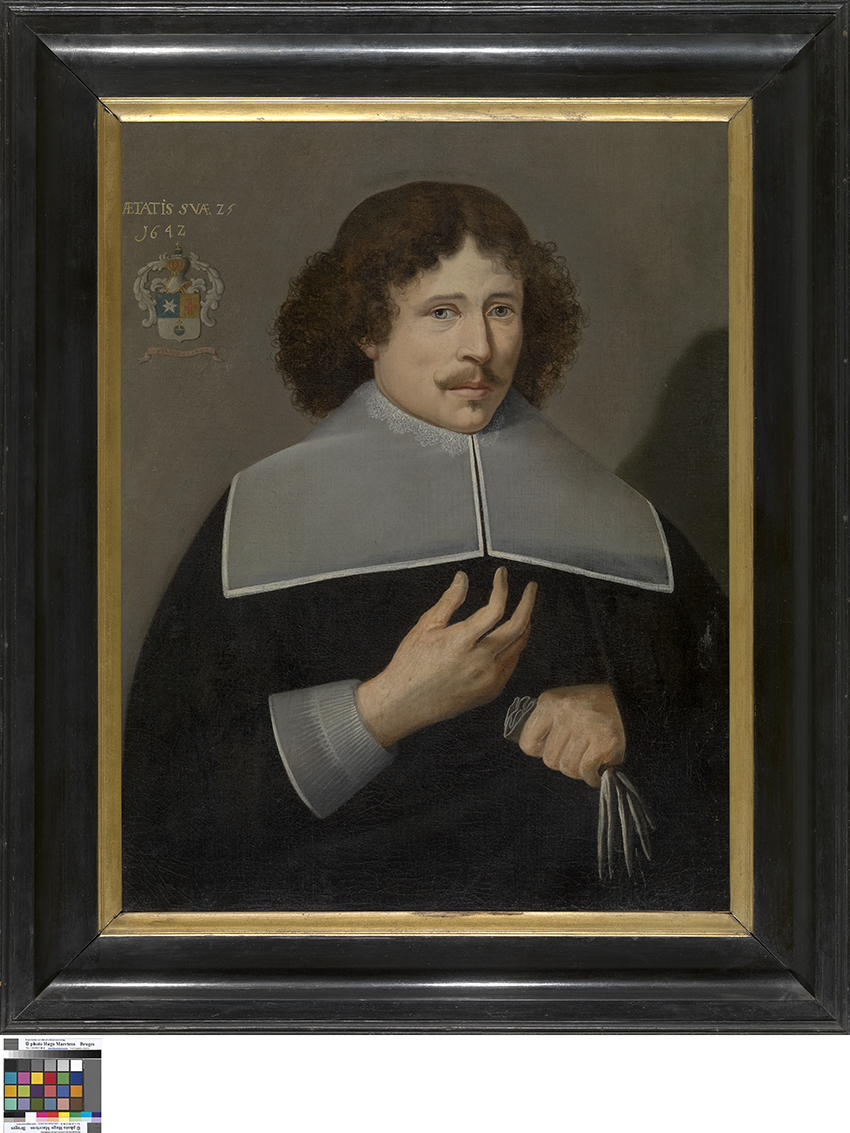 Portret van Emmanuel de Aranda (Anonieme meester, Brugge?, 1642, 1642); collection: Musea Brugge - Groeningemuseum